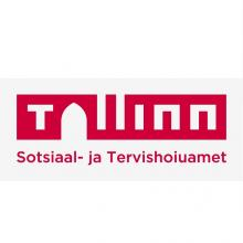 Ameti logo